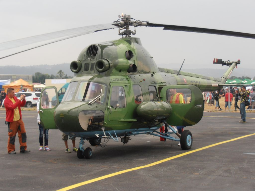 Vrtuľník Mi-2 Vzdušných síl SR na leteckých dňoch SIAF 2012 na leteckej základni Sliač.